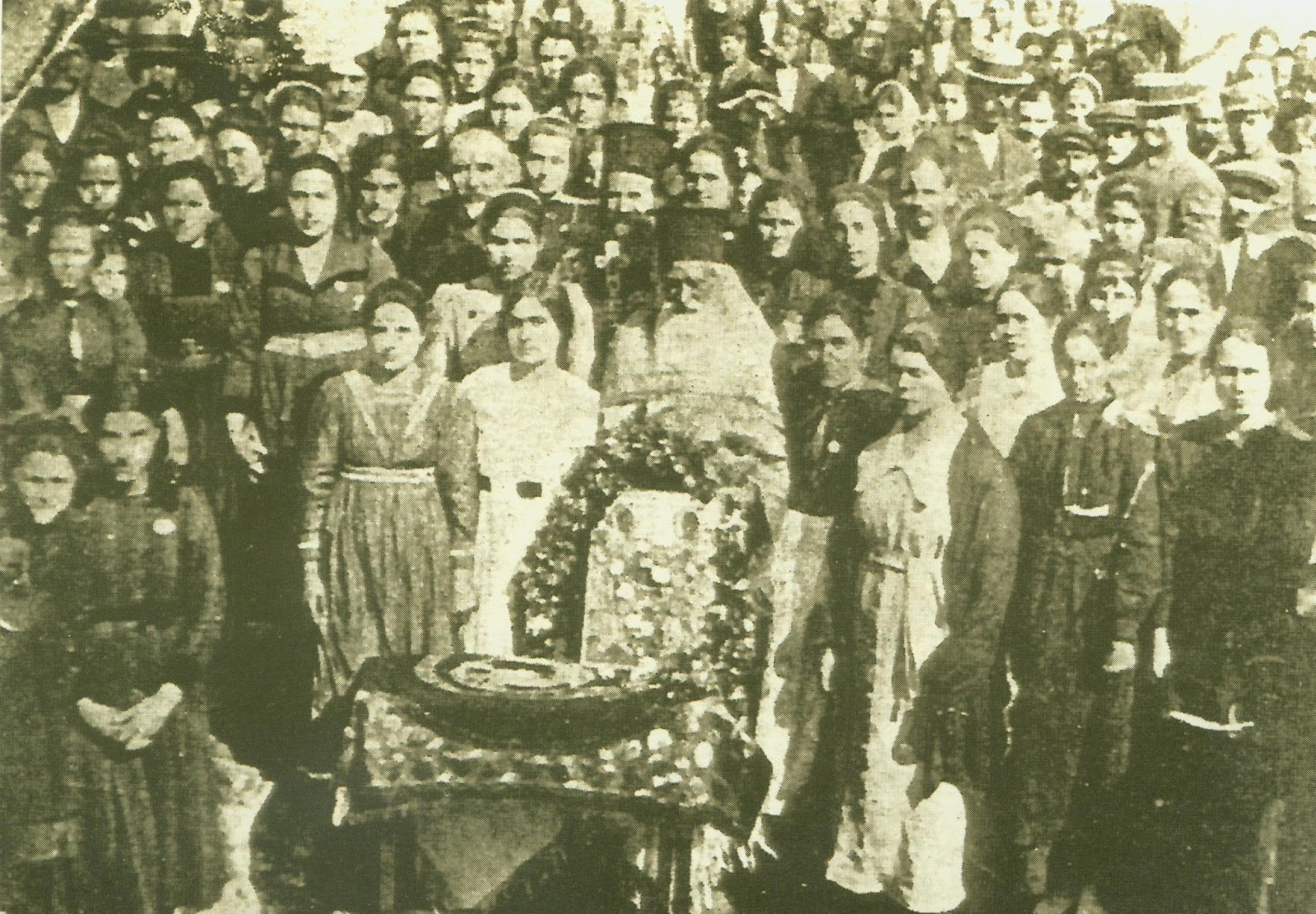 Поставяне на основите на църквата "Свети Безребреници" в Леригово